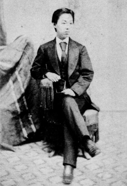 岩倉具経の肖像写真。